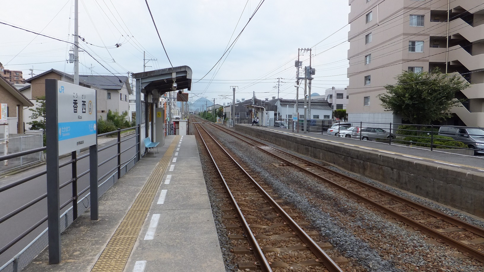 JR予讃線 香西駅 （香川県高松市）下りホーム高松方より撮影